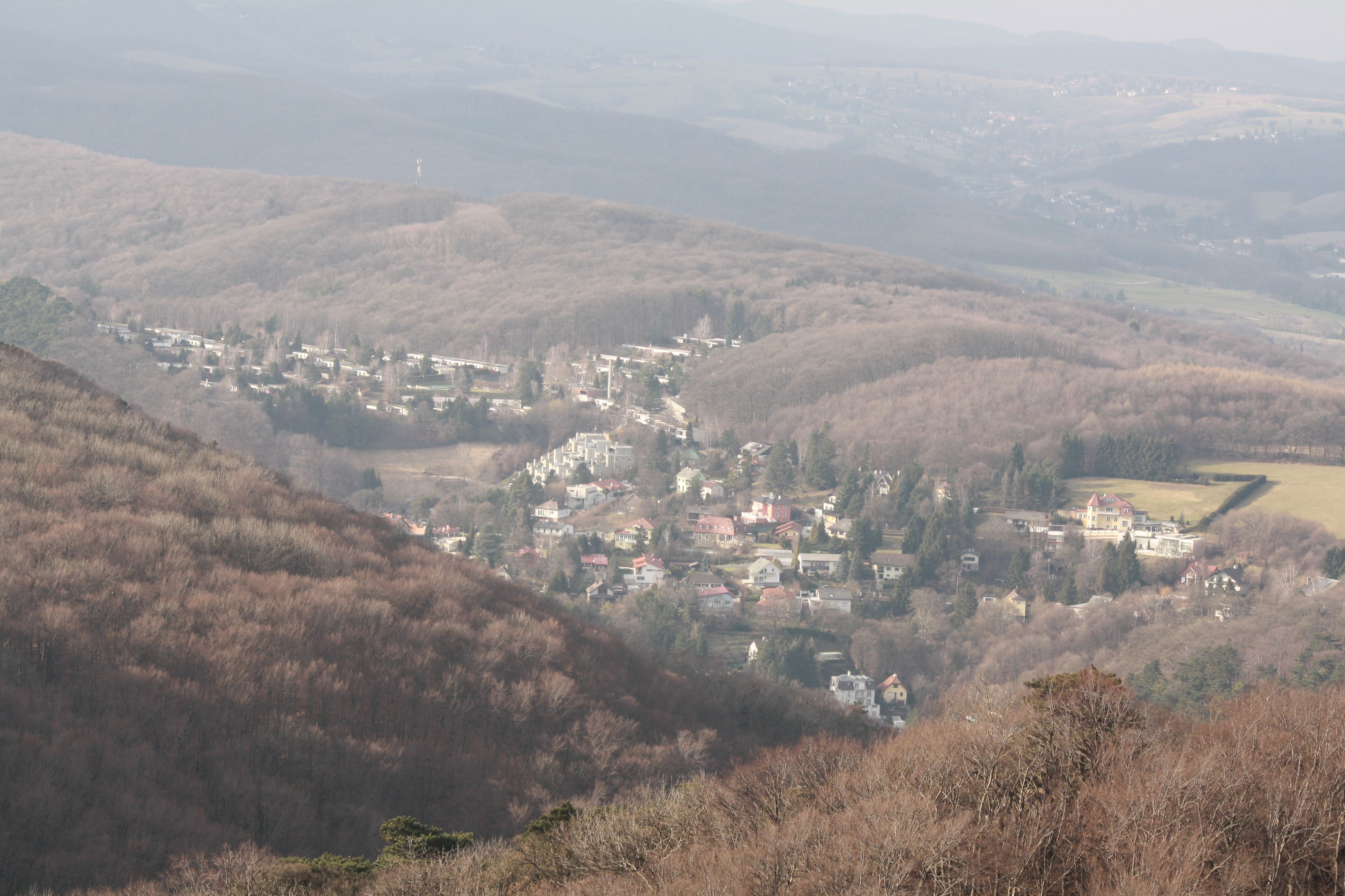 Blick auf Kaltenleutgeben von der Josefswarte bei Perchtoldsdorf